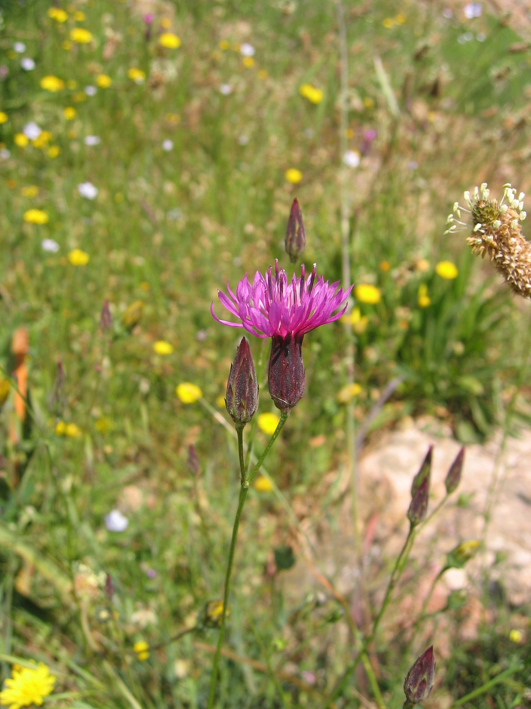 Crupina crupinastrum Calvi (Capu di a Veta), Corse, France